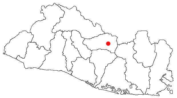 Mapa de Sensuntepeque, El Salvador